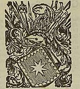 Stemma del Casato dei Giogoli